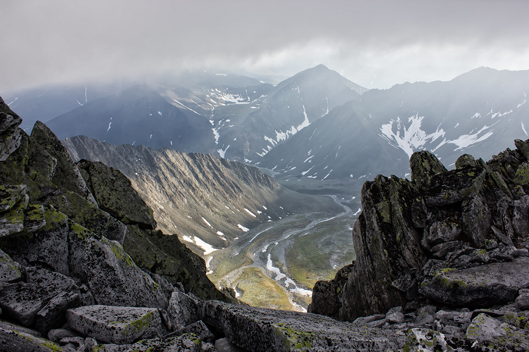 Югыд ва, национальный парк: Парк расположен на востоке Республики Коми, на территории Вуктыльского (47,6% общей площади), Печорского (22,4%) и Интинского (30%) административных районов. На юге парк граничит с Печоро-Илычским государственным природным заповедником, Вуктыл, Вуктыльский район, республика Коми This image is related to the protected area of Russia number 1100067